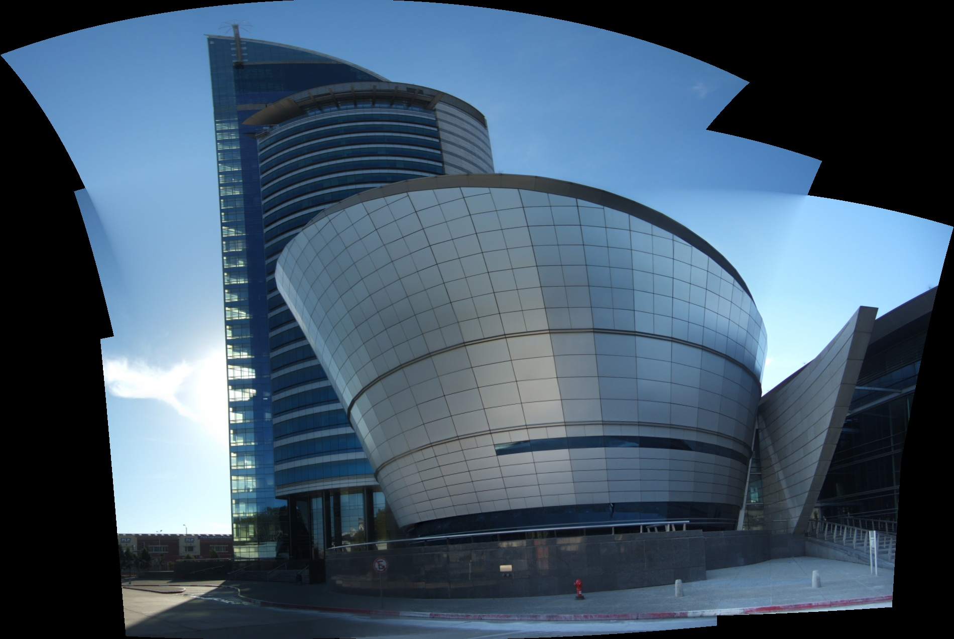 Anfiteatro de la Torre de las Telecomunicaciones de Montevideo, Uruguay.